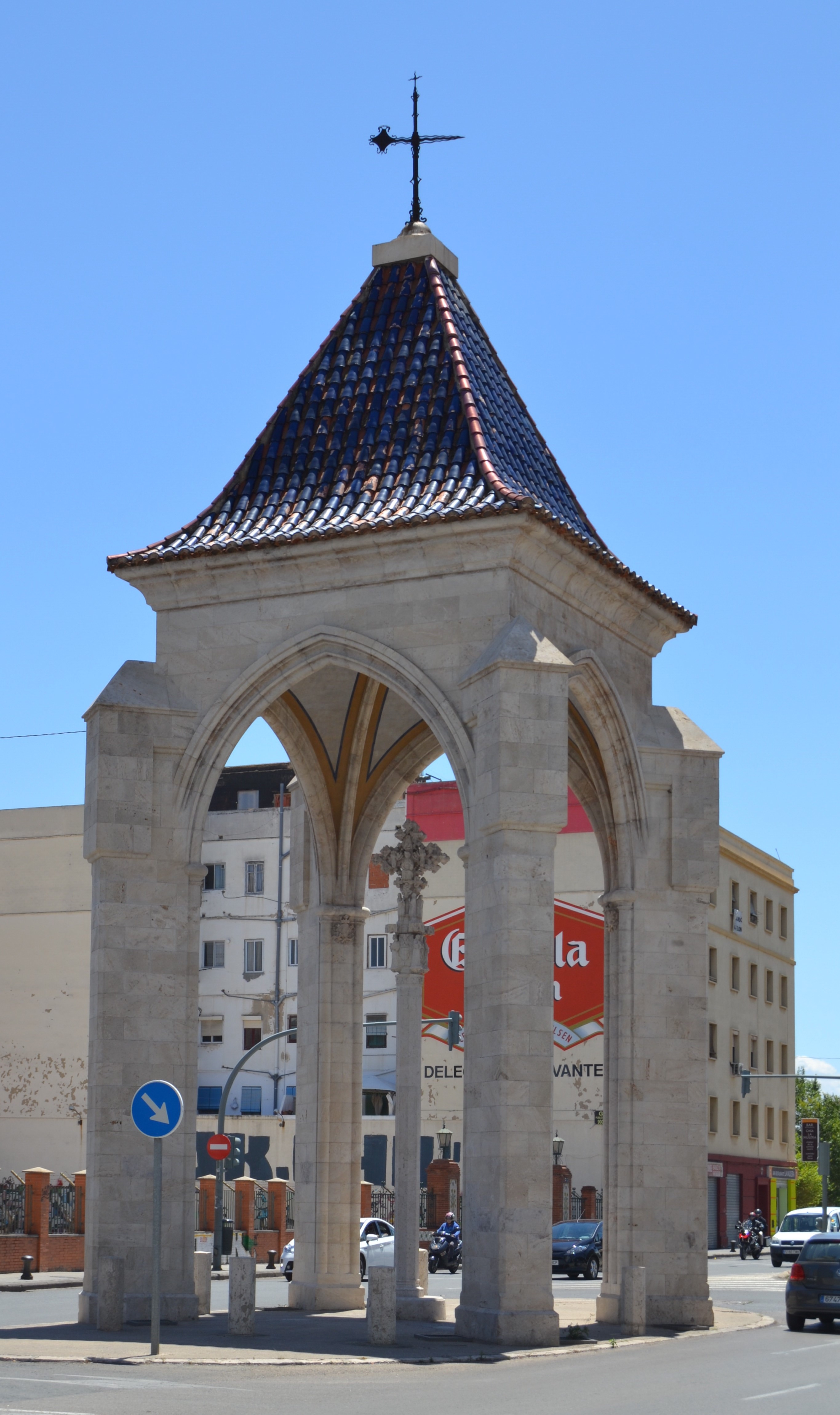 Creu Coberta del carrer sant Vicent, València.